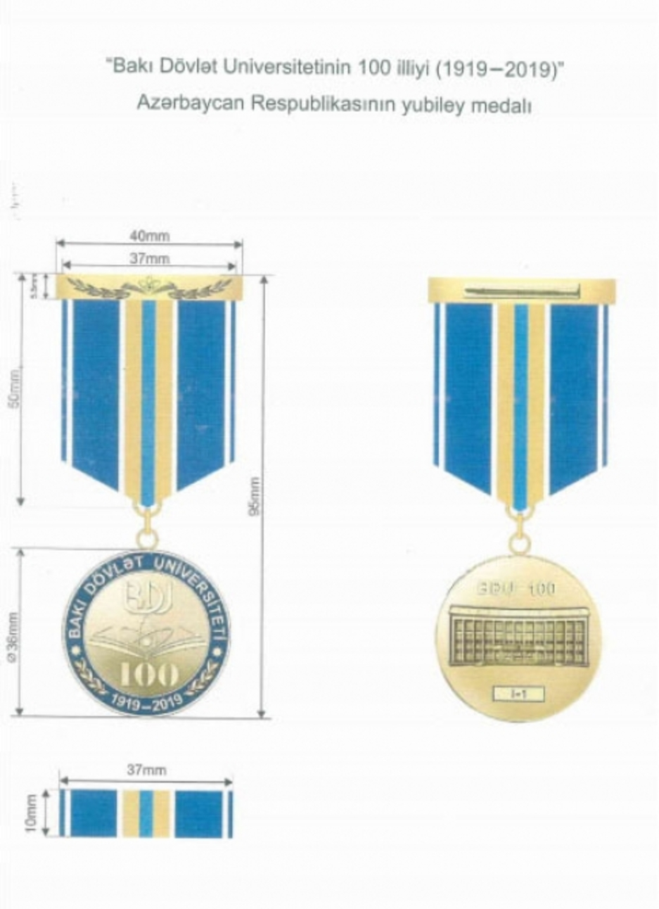 "Bakı Dövlət Universitetinin 100 illiyi (1919-2019)" yubiley medalının təsviri